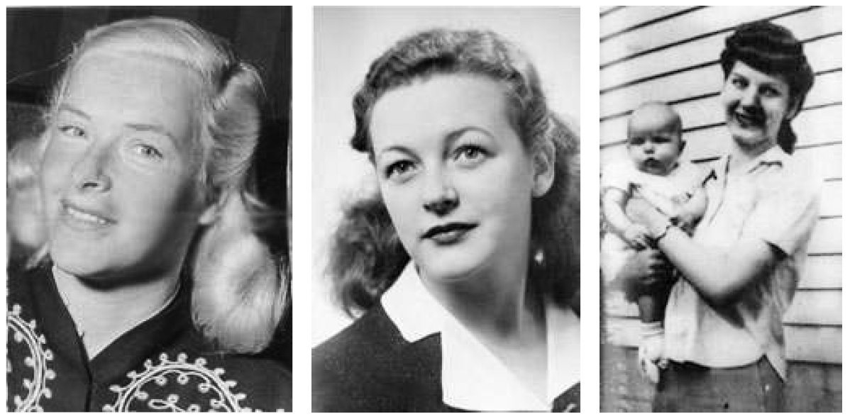 Betty Farmer, Dagmar Lahlum, Freda Stevenson et la fille d'Eddie Chapman, Diane. Dossier du MI5 déclassifié et tombé dans le domaine public le 01/01/2005.